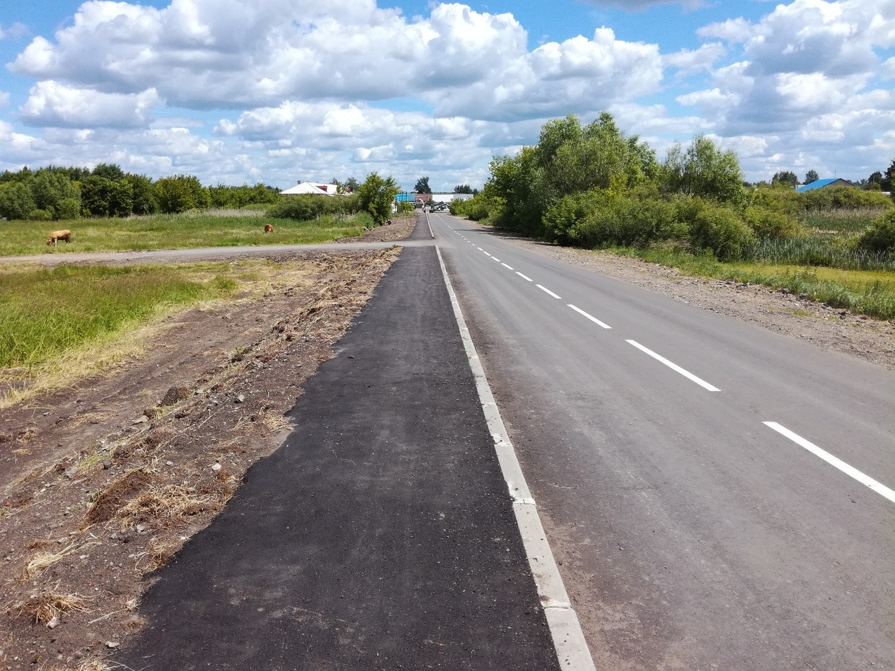 Новая дорога к улице Железнодорожная